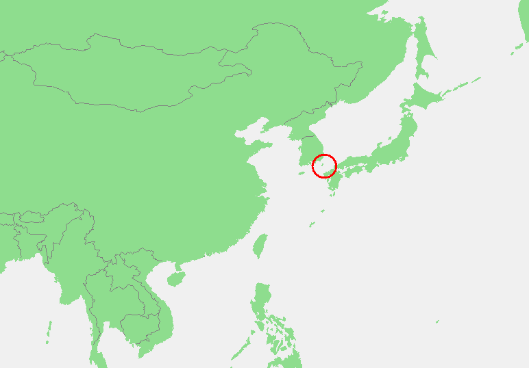 Localización do estreito.